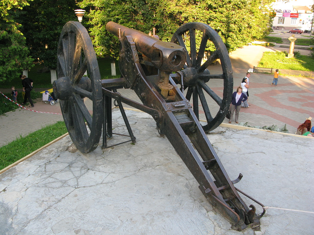 87-мм легкая пушка на братской могиле героев 1812 г. в Малоярославце